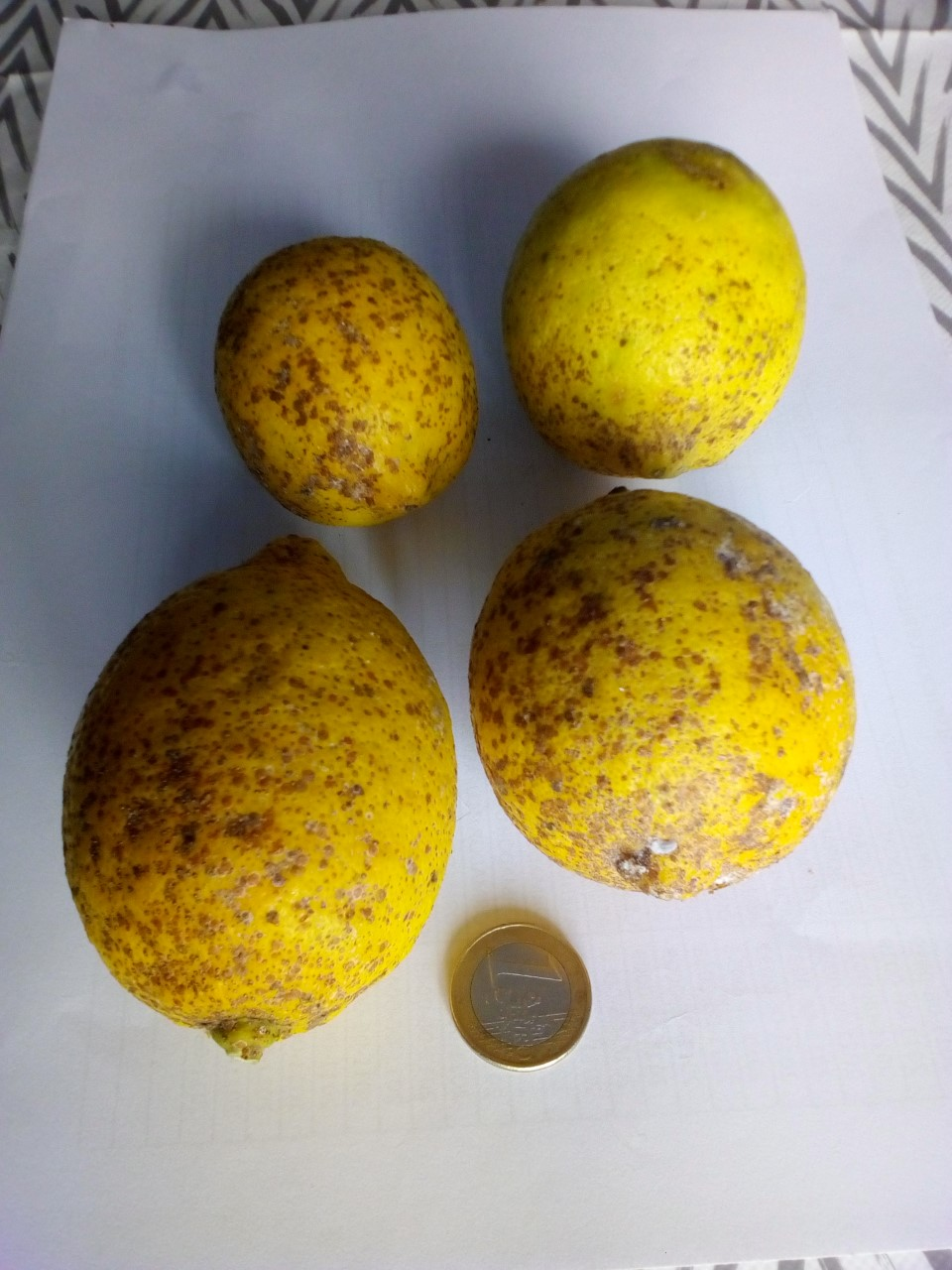 Citronoj atakitaj de plago